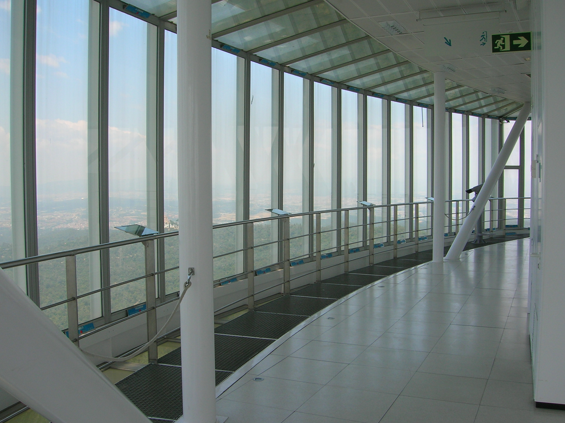 Interior del mirador de la torre de collserola a Barcelona